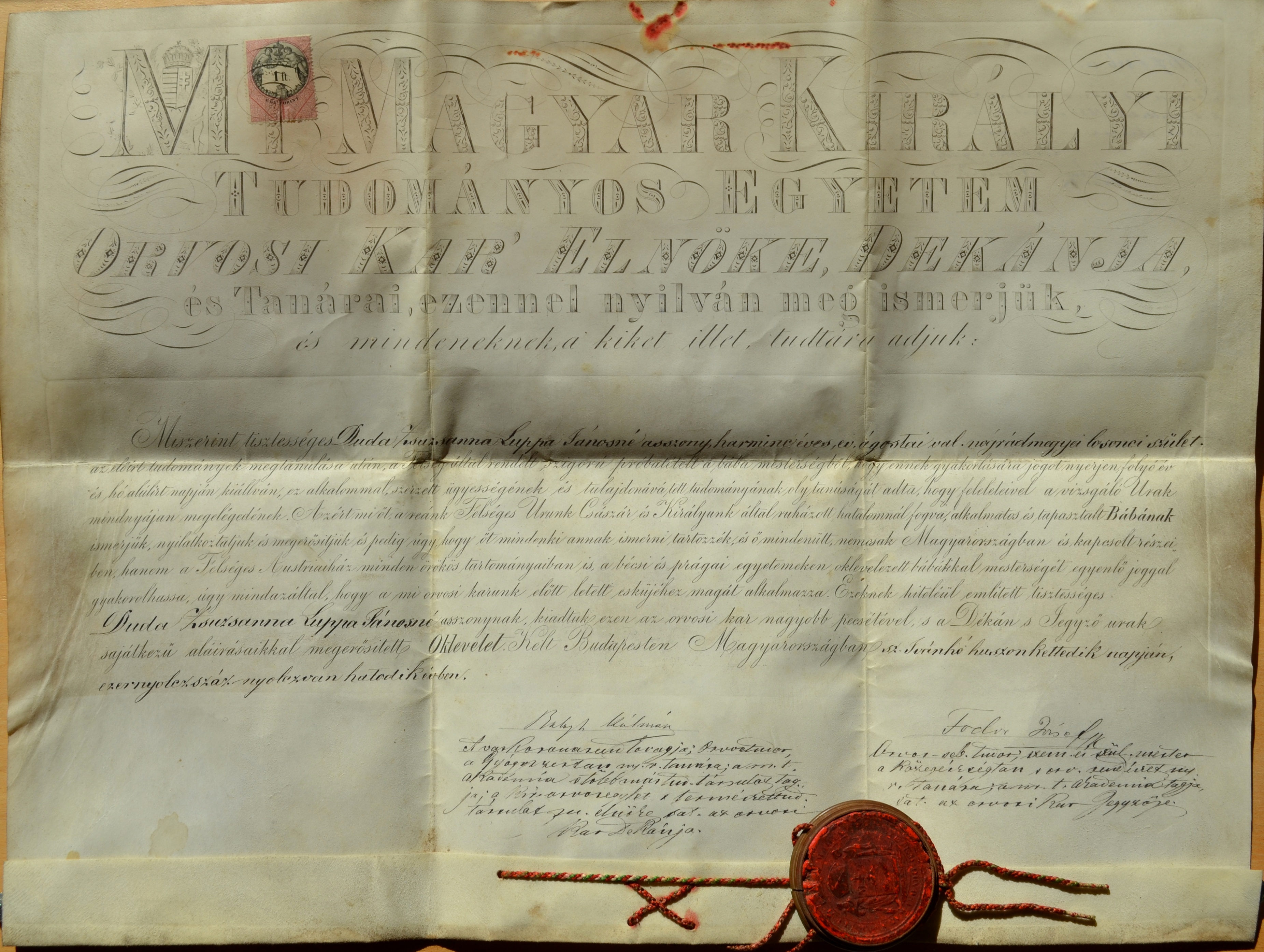 Magyar Királyi Tudományos egyetem orvosi Karának Losoncon született Duda Zsuzsanna, Luppa Jánosné asszony részére kiállított diplomája, Budapest 1886. július 22.